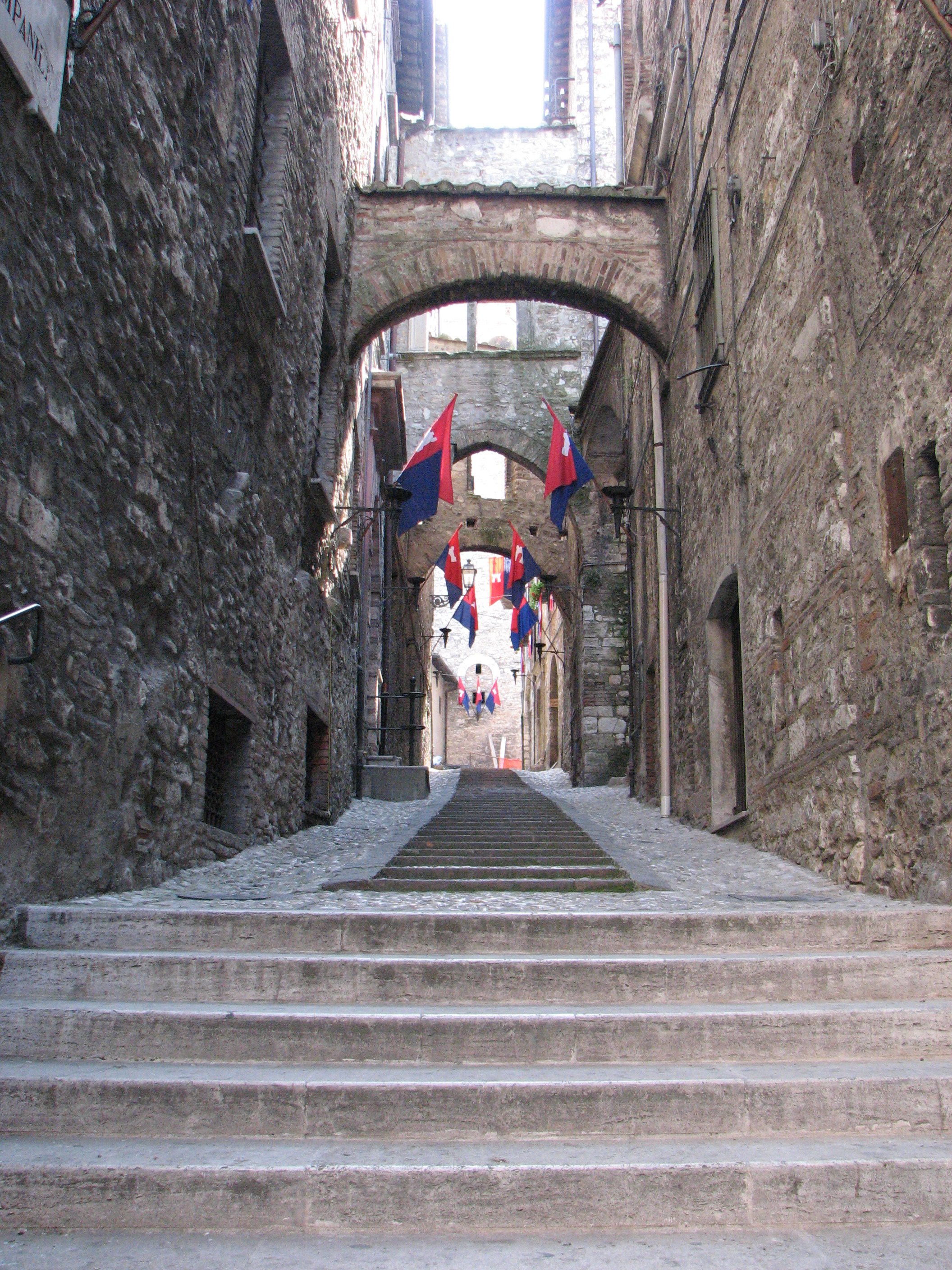 Narni Vicolo